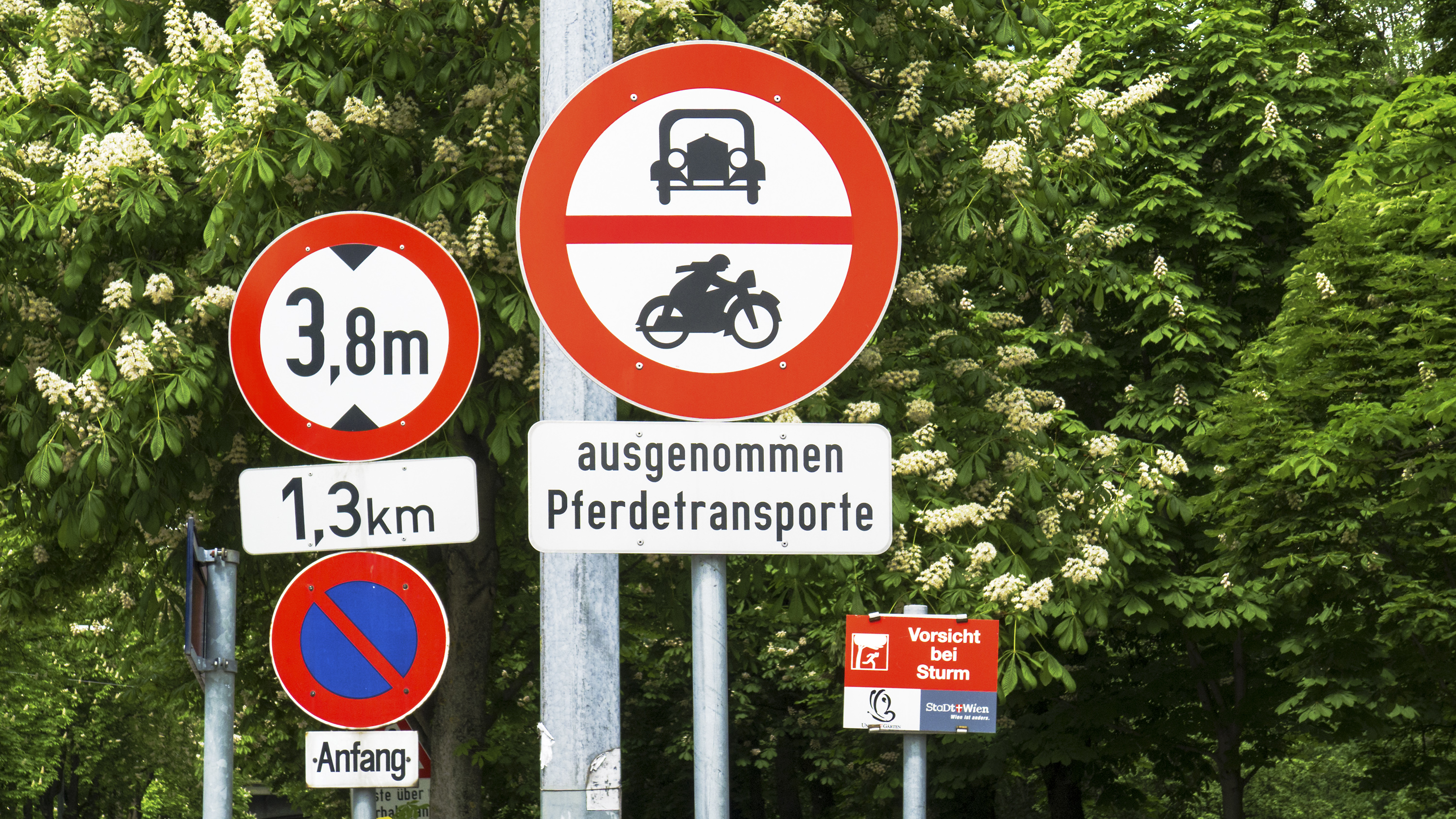 Schilder an der Hauptallee in Wien 2